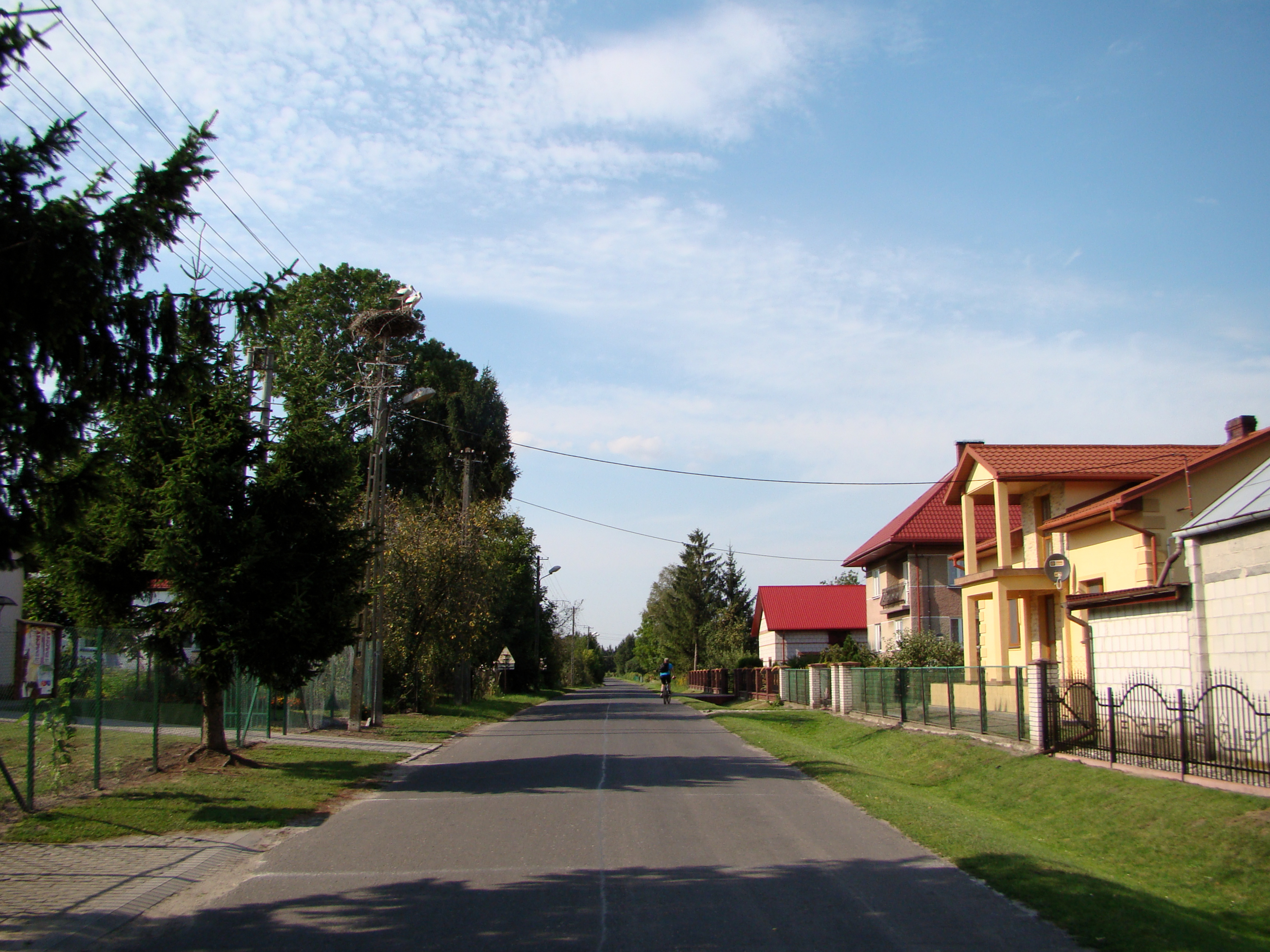 Ulice ve městě Gozdów, Polsko